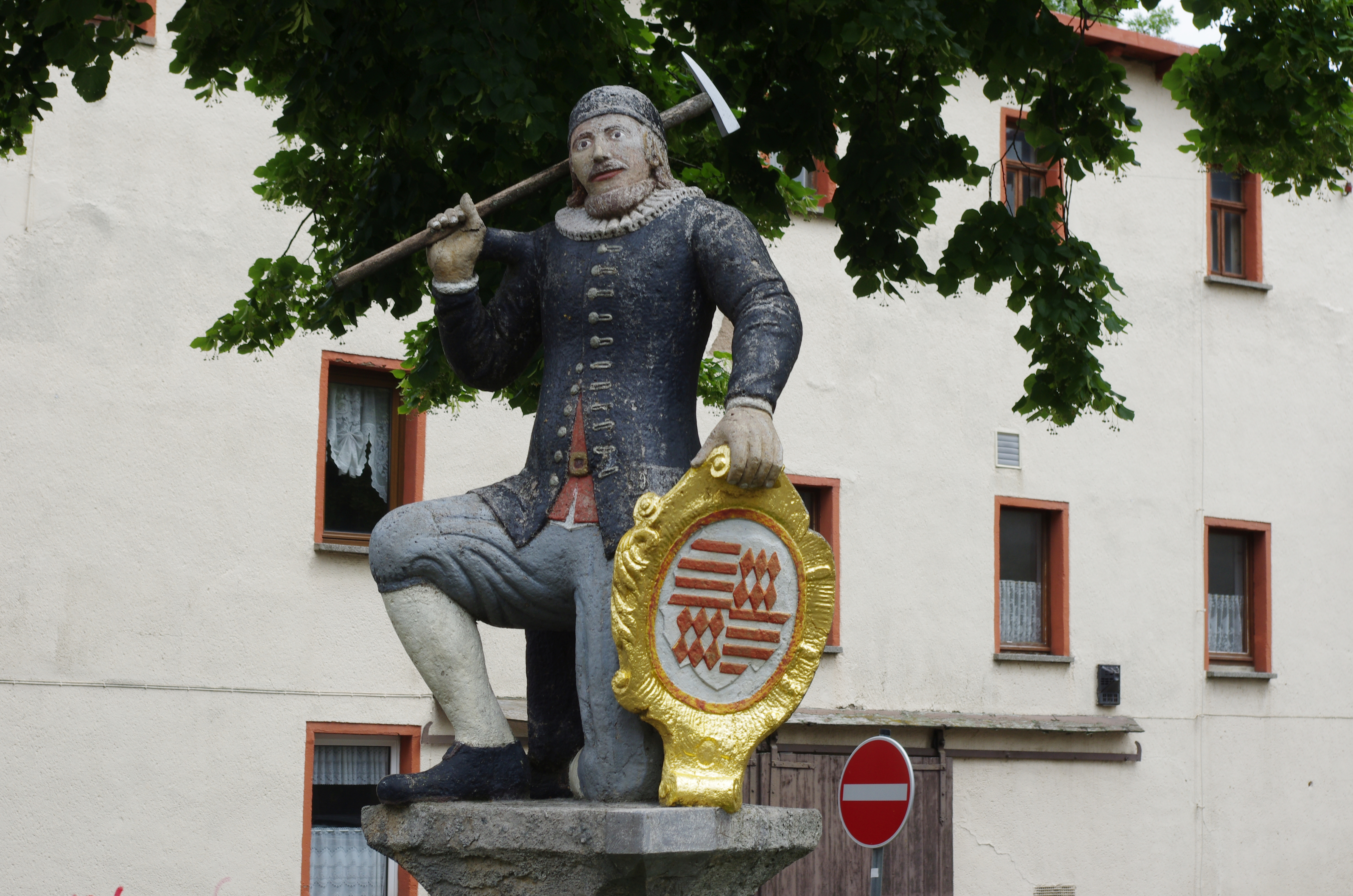 Lutherstadt Eisleben in Sachsen-Anhalt. Das Denkmal Kamerad Martin ist die Symbolfigur des Mansfelder Bergbaues. Das Denkmal befindet sich an der Breite Straße.